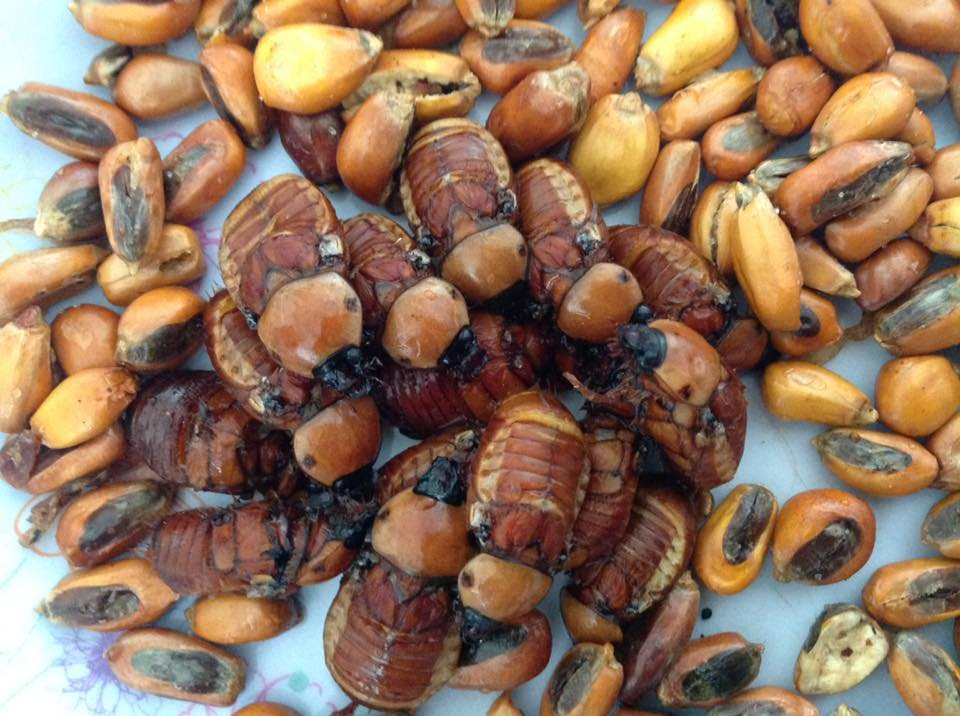 Aquí se puede apreciar un plato típico y exótico de la ciudad de Quito, sector Pomásqui, Calderón y San José de Morán.